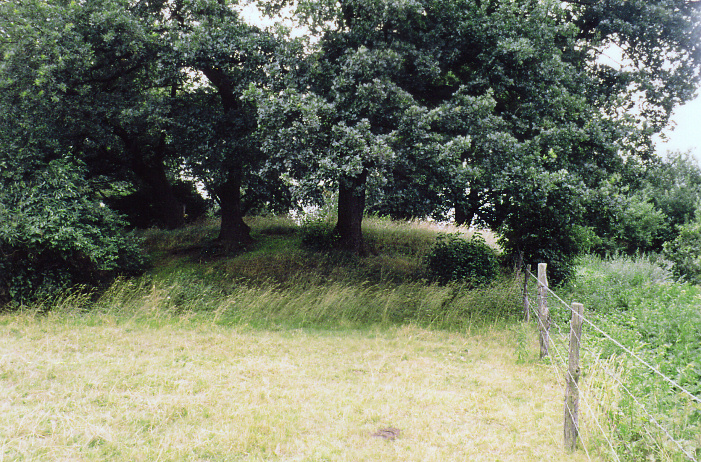 Borwall